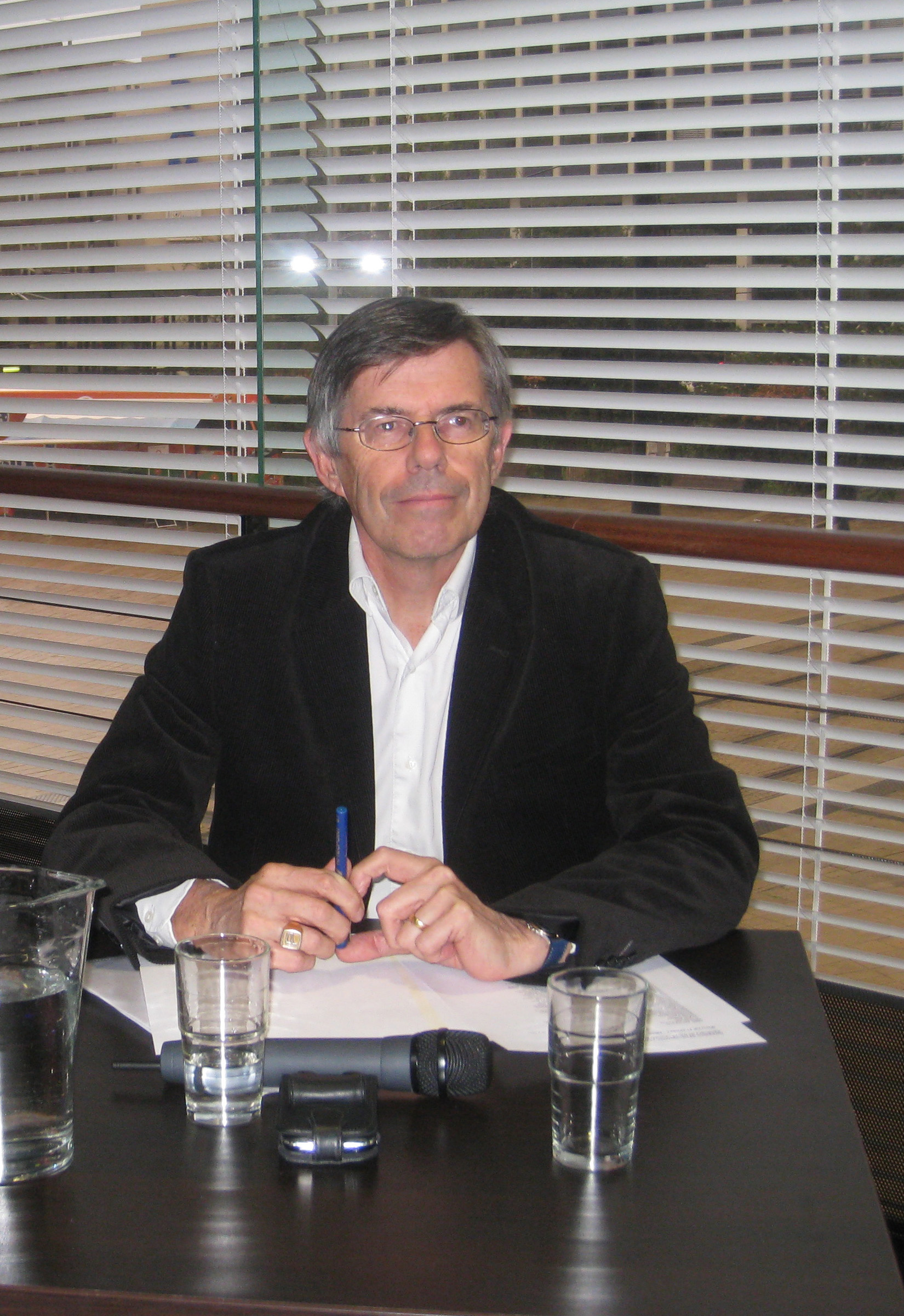 photo personnelle